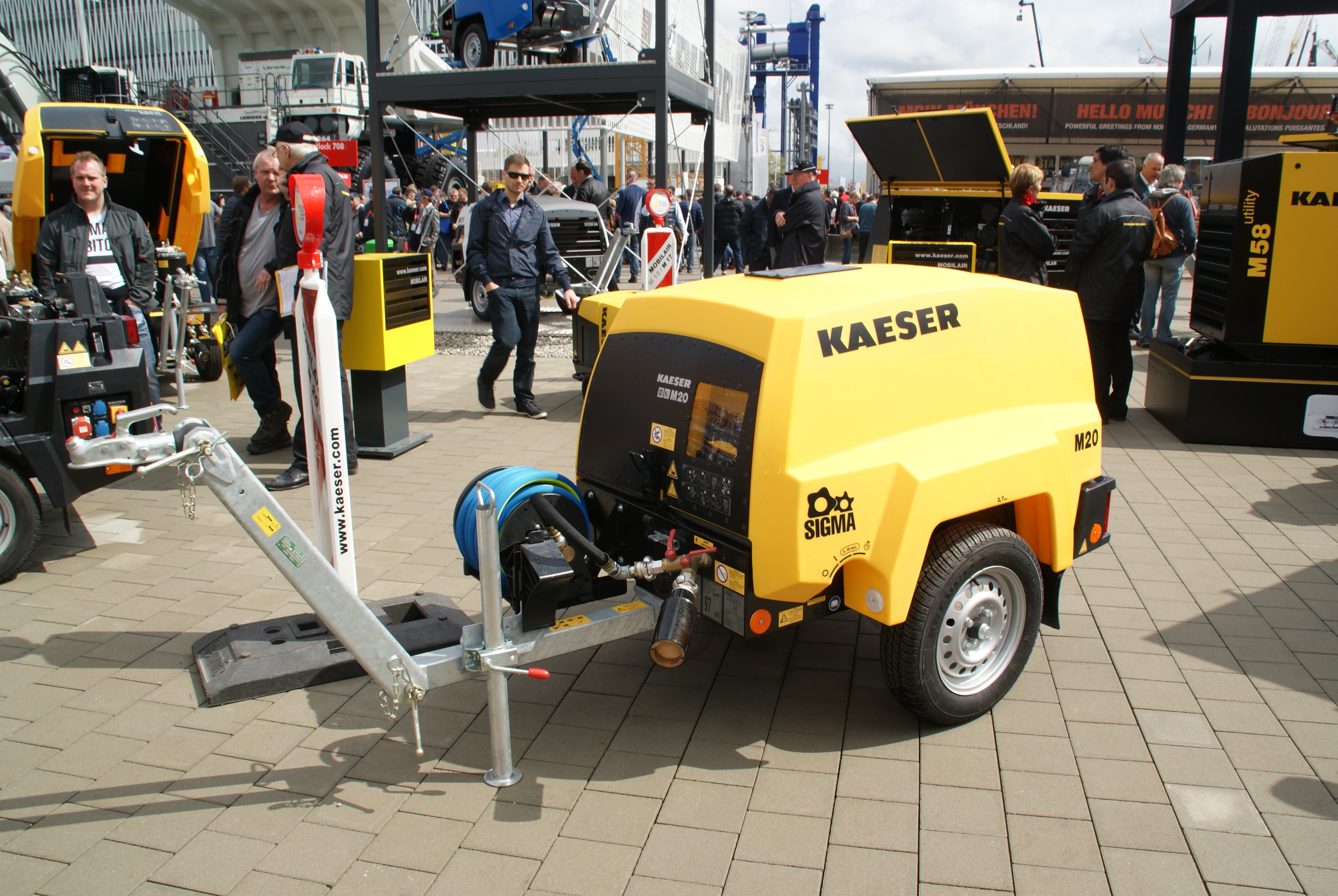 Kleiner Kompressor der Fa. Kaeser